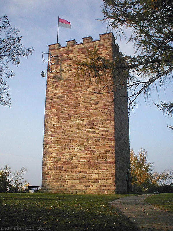 Wasserturm auf dem Schlossberg über Sternenfels, Enzkreis, Baden-Württemberg